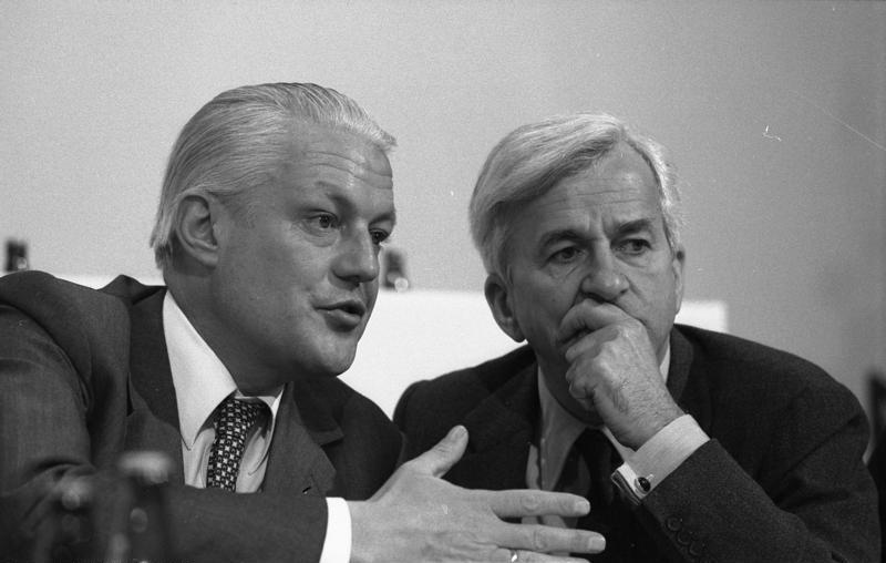 26. Bundesparteitag der CDU in der Friedrich-Ebert-Halle in Ludwigshafen 23.-25.10.1978